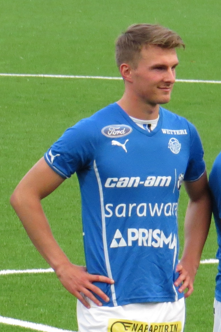 Janne Saksela, suomalainen jalkapalloilija Rovaniemen Palloseuran joukkueessa kaudella 2015.